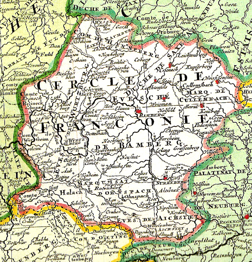 Karte "Deutschen Reichs - 1740 " Kupferstich von Jaillot b. Reinier & Josua Ottens Amsterdam - Ausschnitt Fränkischer Reichskreis